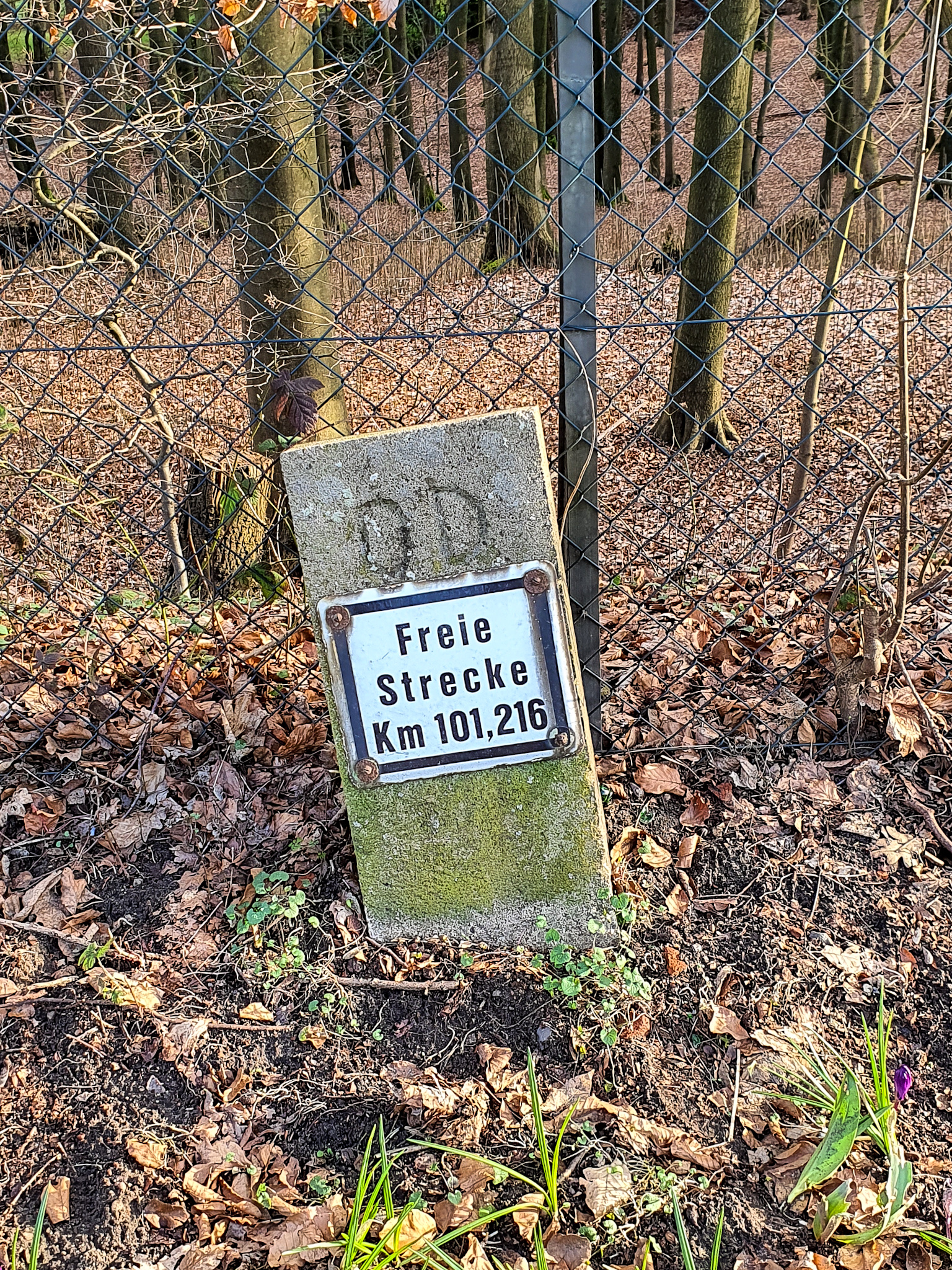 Schild an der Bremer Str., Hamburg-Harburg